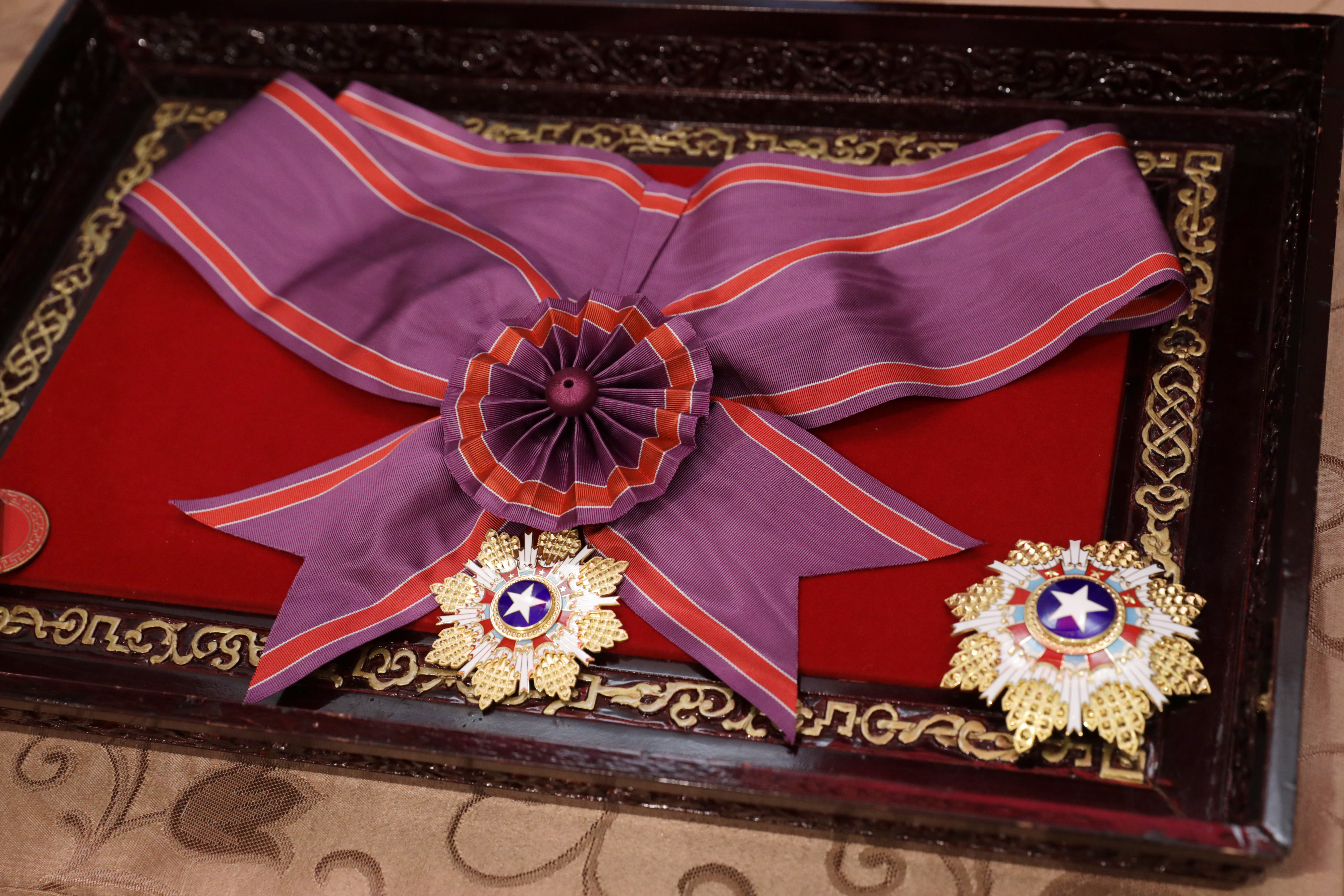 一等（特種大綬）景星勳章。